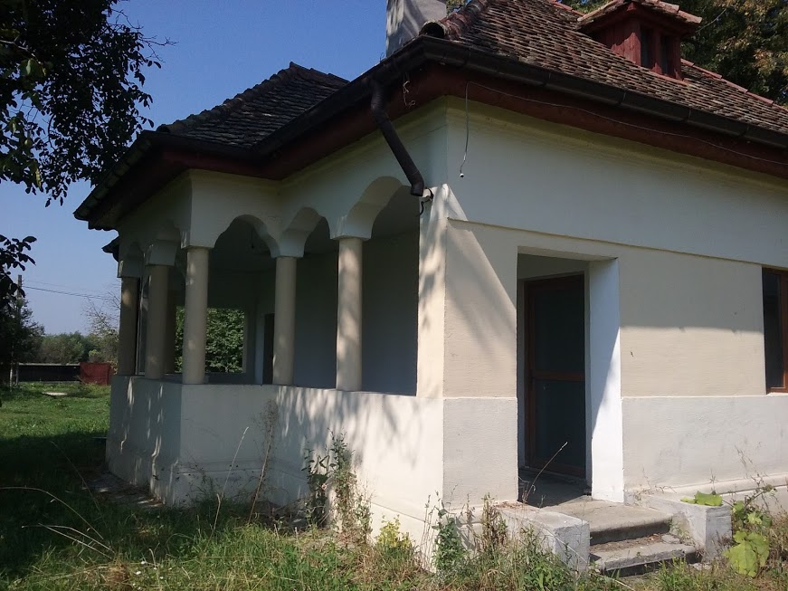 Ansamblul castelului Brâncoveanu, sat Sâmbăta de Sus; comuna Sâmbăta de Sus 615 sec. XVIII - XIX